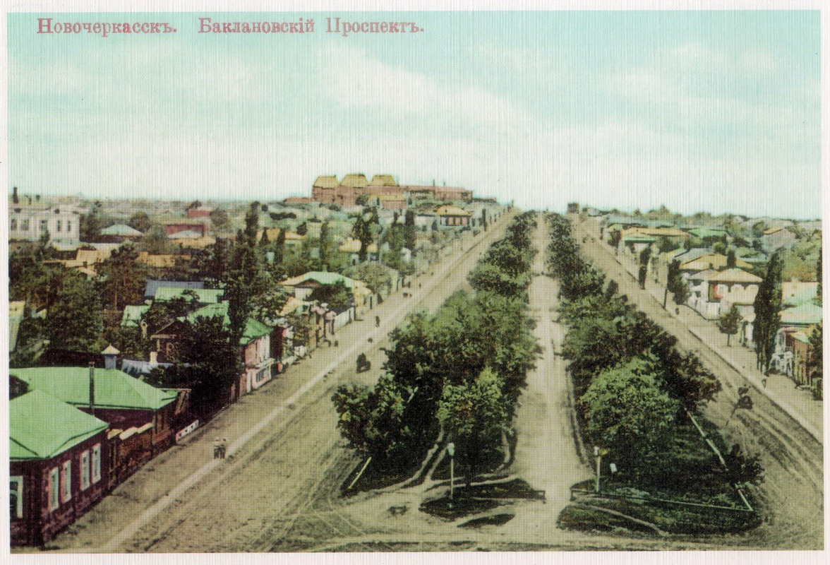 Баклановский проспект на дореволюционной открытке